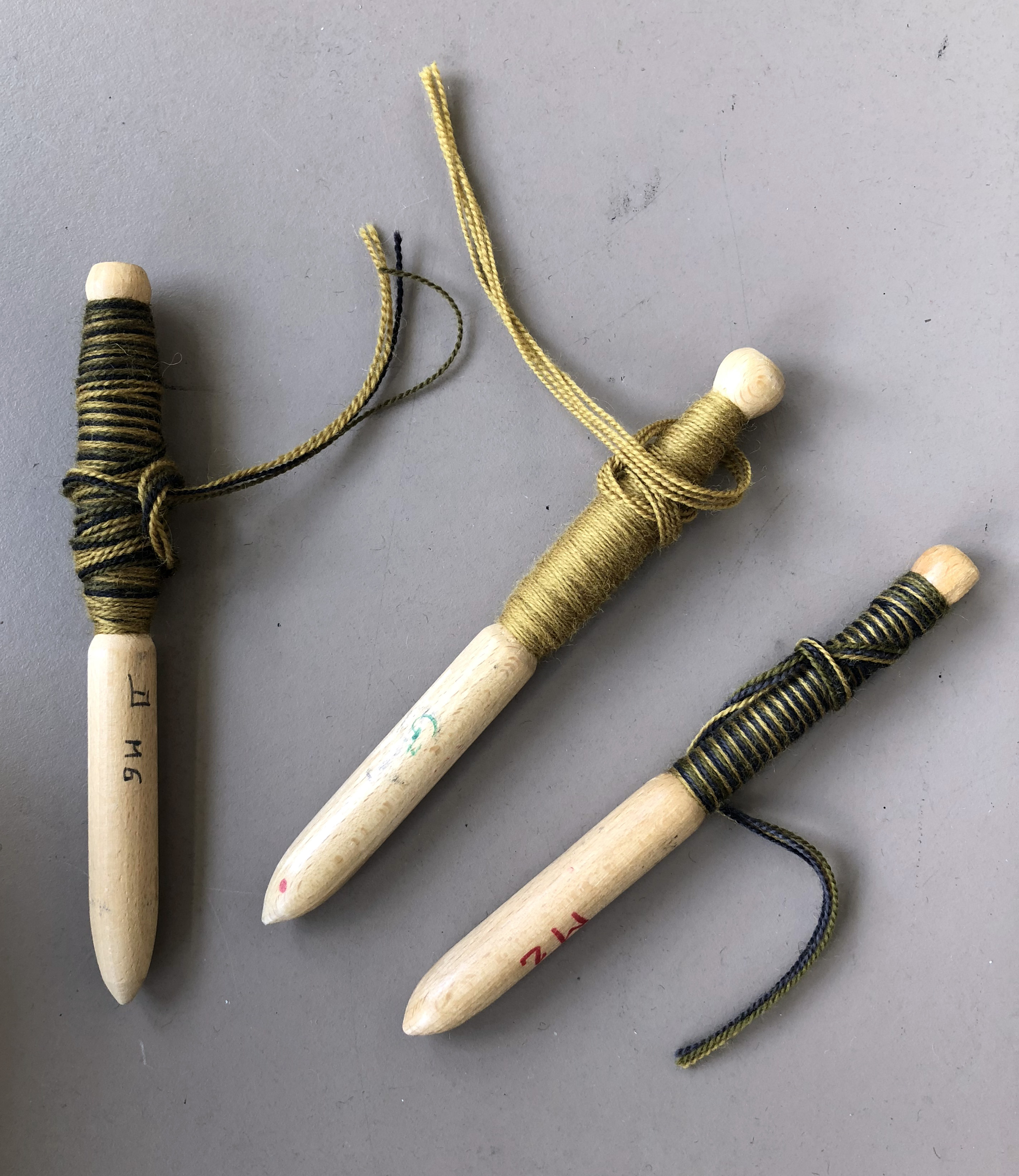 Broches : piquets de bois sur lesquels sont enroulés les fils de laine.